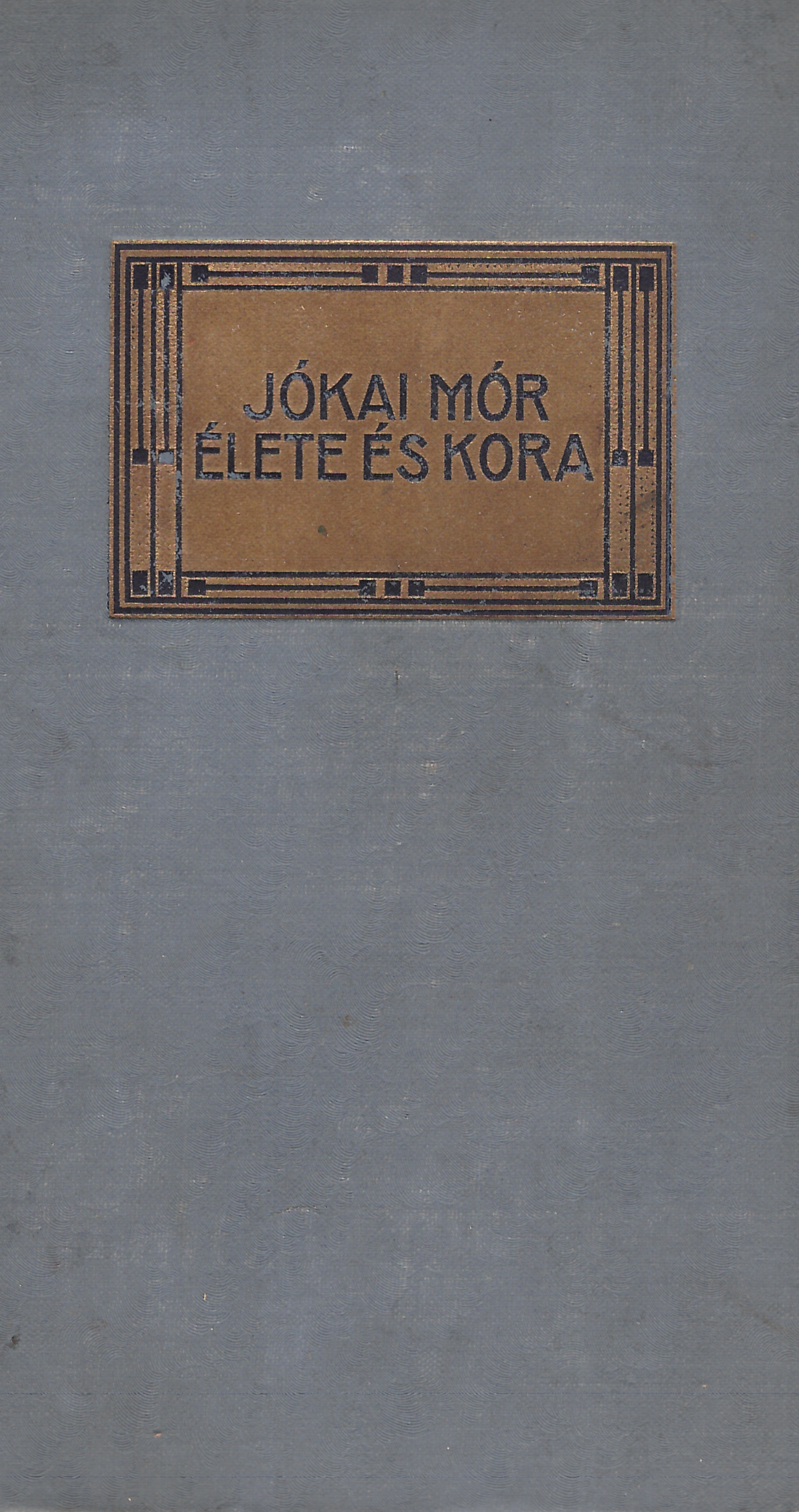 Mikszáth Kálmán művei (1910-as évek)